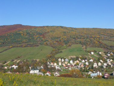 Beloveza Village (Slovakia)